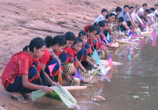 Ful Biju-Chengi river-Khagrachori.